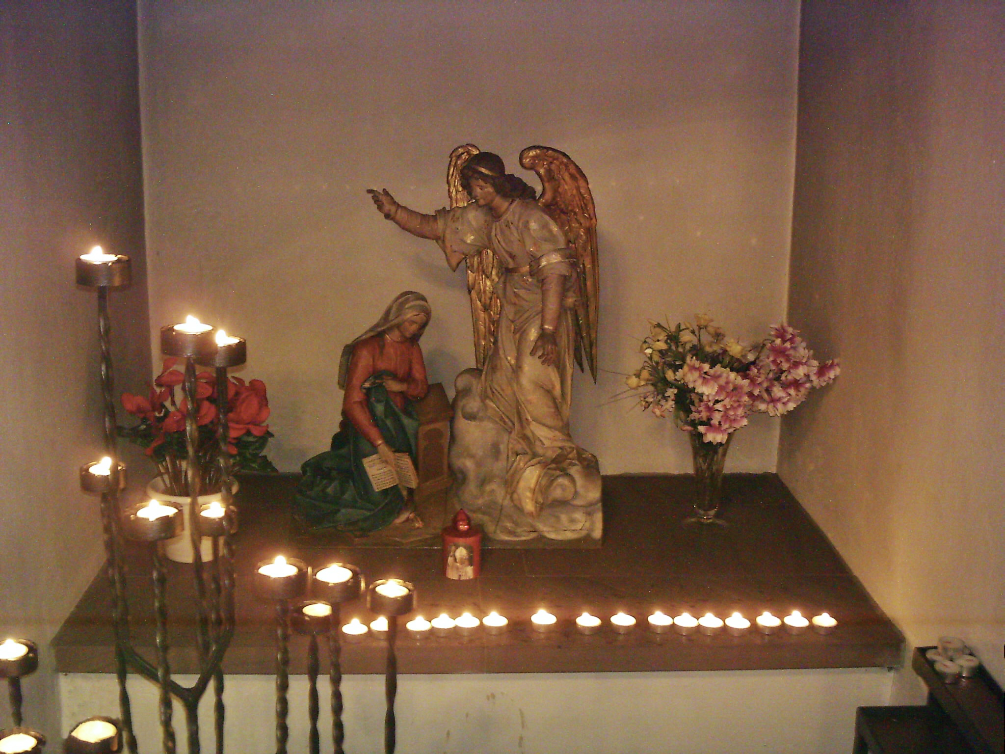 Römisch-Katholische Kirche St. Josef in Herzberg am Harz, Darstellung Marie Verkündigung.